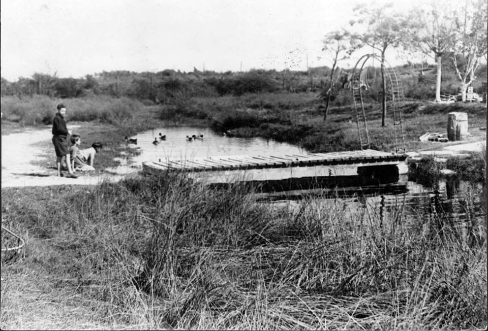 Bañado de Flores, actual Arroyo Cildáñez en el Parque Almirante Brown, Buenos Aires, Argentina, en el año 1962